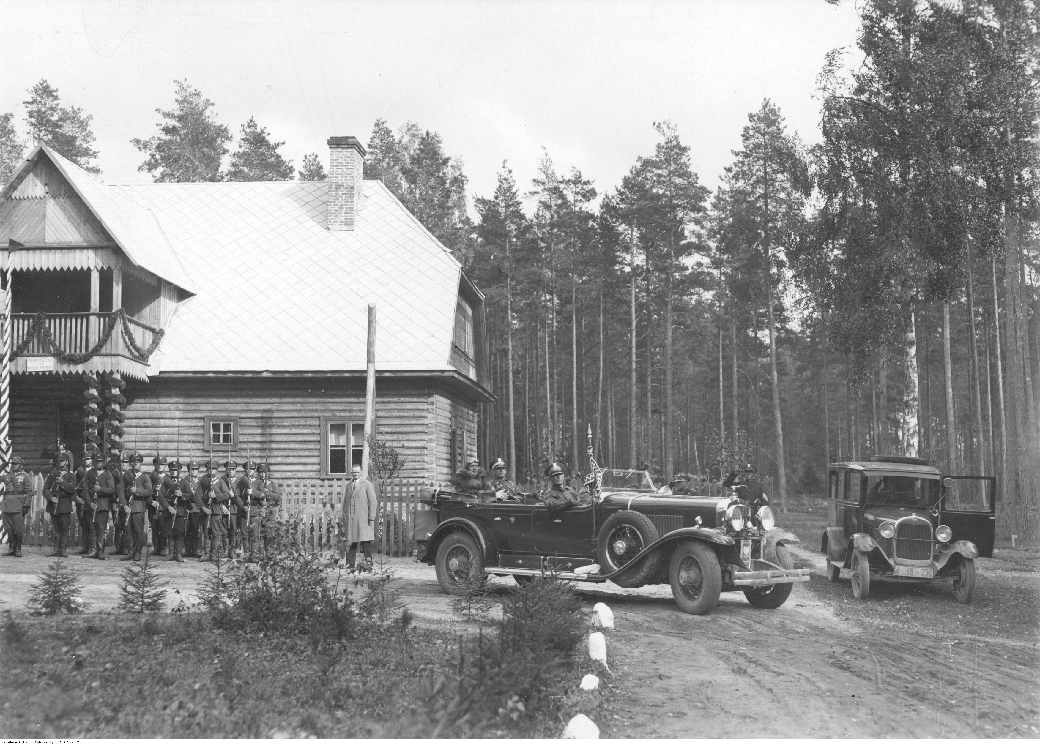 Wizyta prezydenta RP Ignacego Mościckiego na kresach wschodnich - pobyt w Borkowszczyżnie k. Wilna. Prezydent RP Ignacy Mościcki w samochodzie opuszcza strażnicę Korpusu Ochrony Pogranicza. Widoczni także m.in.: adiutant prezydenta RP rtm. Wacław Calewski (siedzi obok kierowcy), gen. Mieczysław Norwid-Neugebauer (siedzi obok prezydenta). Koncern Ilustrowany Kurier Codzienny - Archiwum Ilustracji